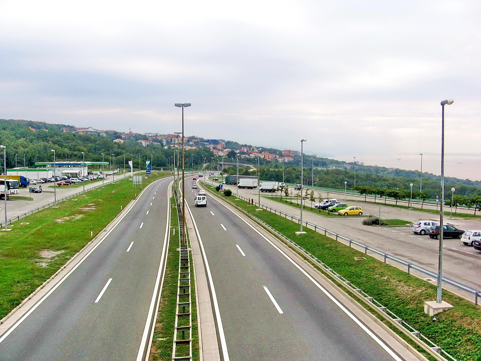 road